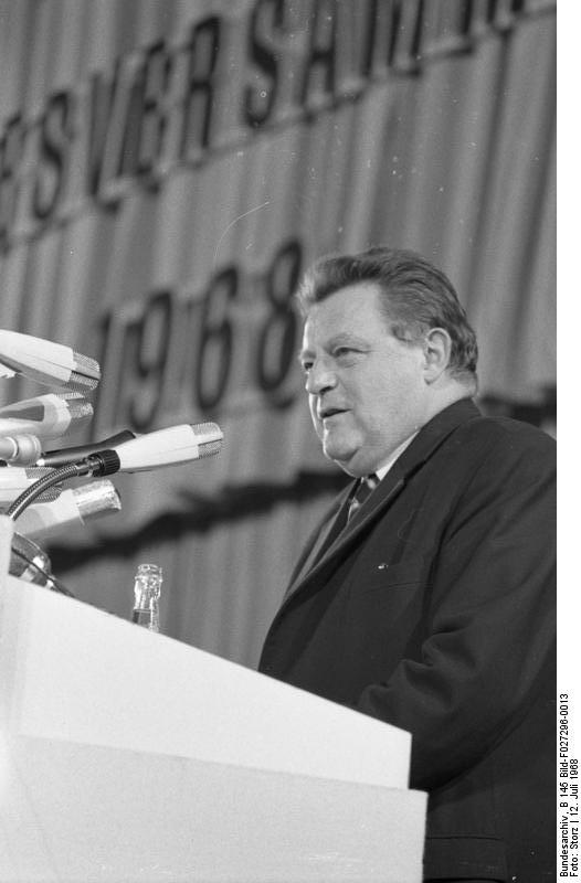 CSU-Landesversammlung in München